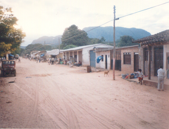 Charagua, Santa Cruz, Bolivia Main street - Calle principal